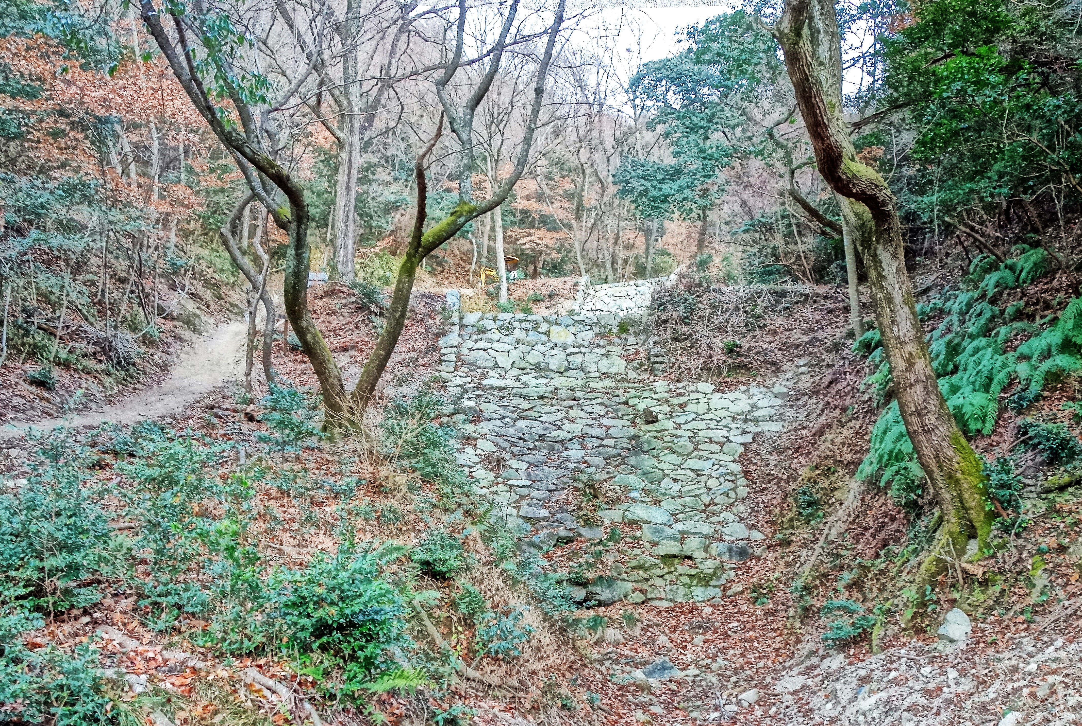 広島県福山市芦田町の別所砂留の11-12番砂留。8番砂留の上の広場から撮影。